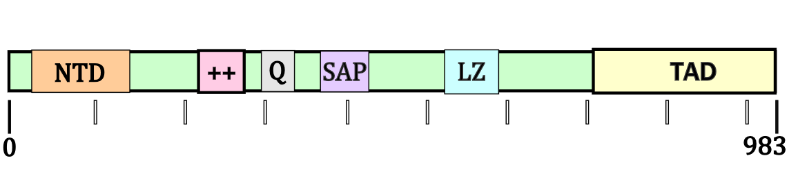 Schematic illustration of main domains of miocardin. Based on work